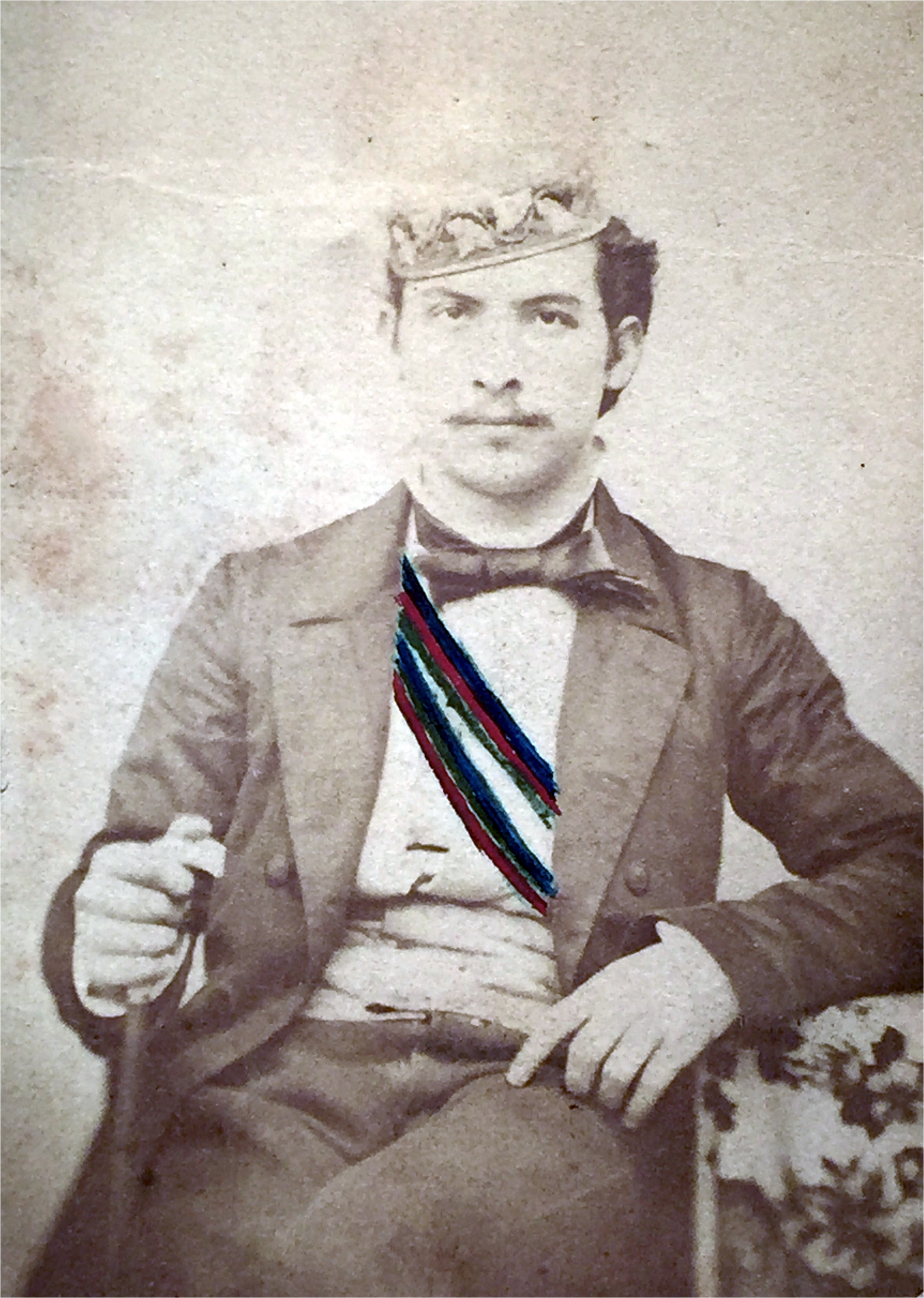 Porträtfotografie von Ludwig Gundlach als Corpsstudent in Leipzig